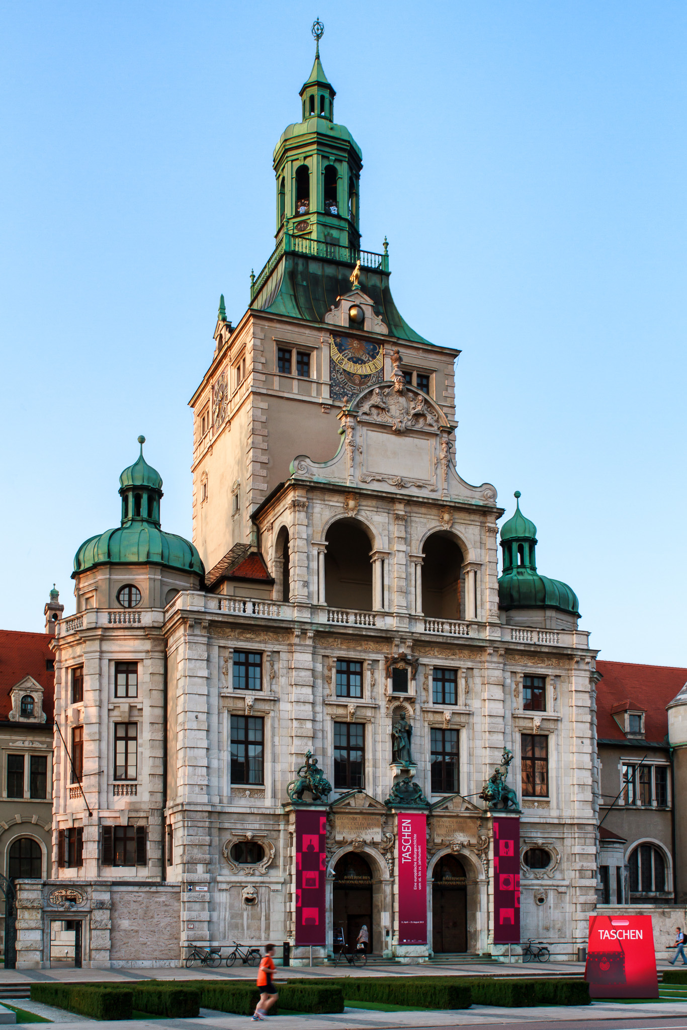 Bayerisches Nationalmuseum - München - 2013